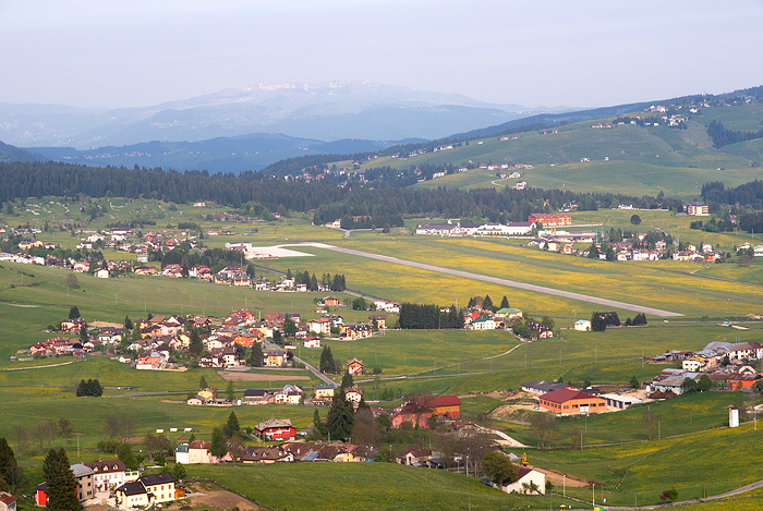 Asiago Airfield, Italian Alps